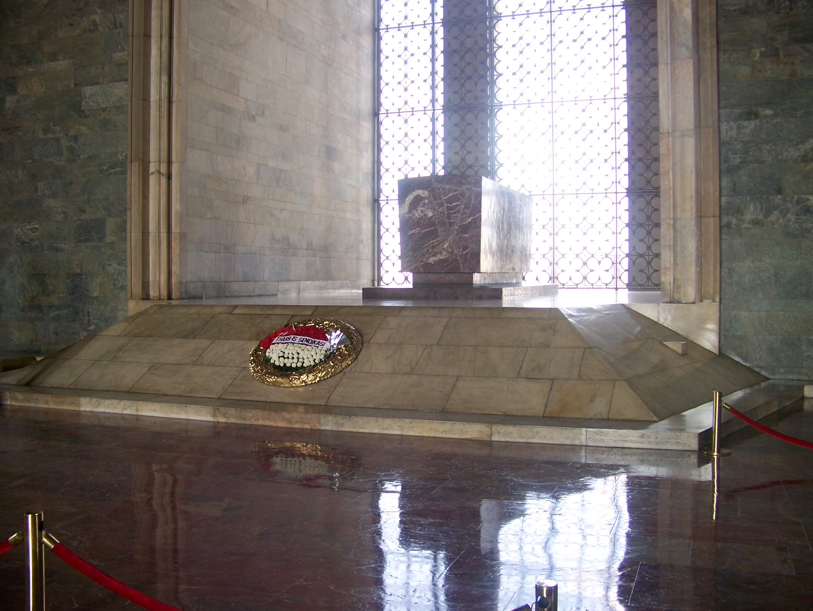 la tombe d'atatürk